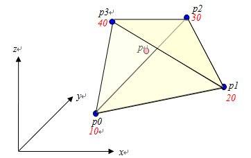 立体要素内の補間